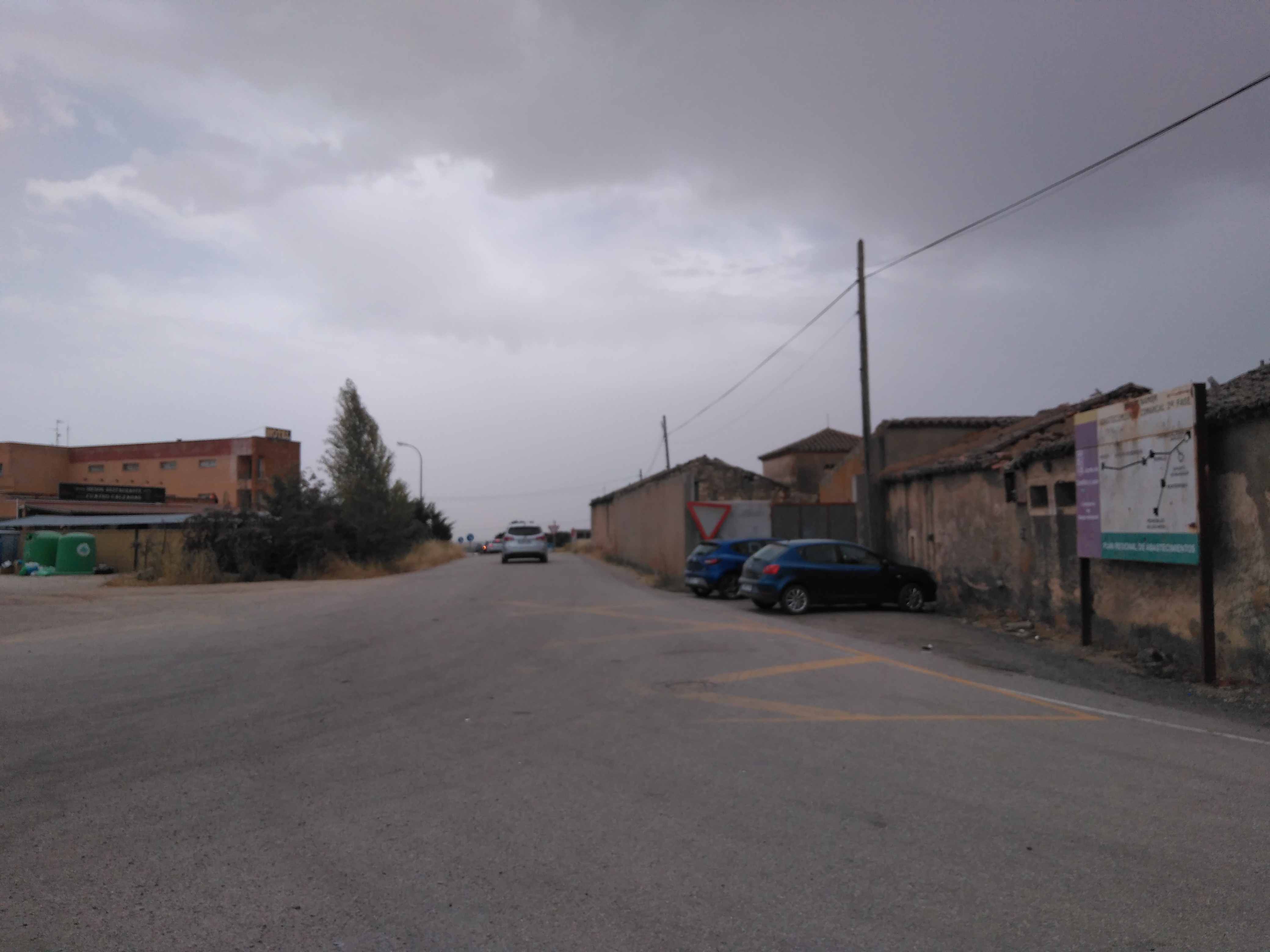 Cuatro calzadas, Salamanca (España)